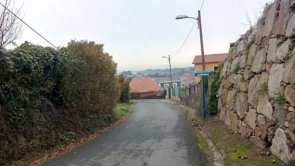 Vista do Castiñeiro, Neda.